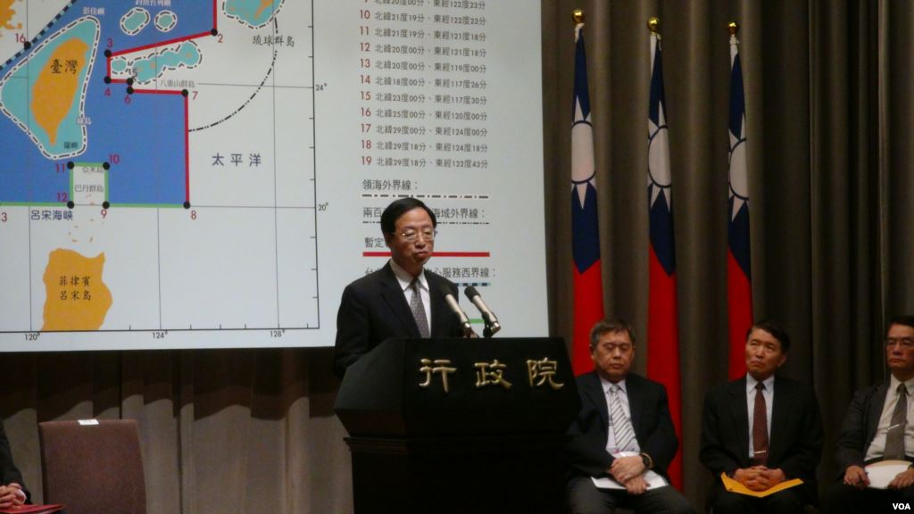 中華民國行政院院長江宜樺就廣大興28號事件舉行記者會。